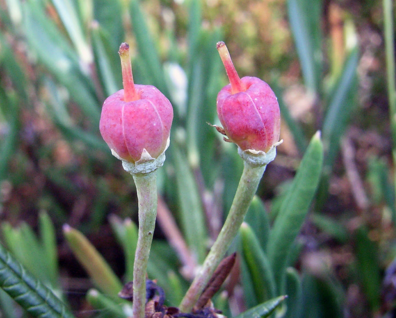 Früchte der Rosmarinheide (Andromeda polifolia), Nordwestdeutschland